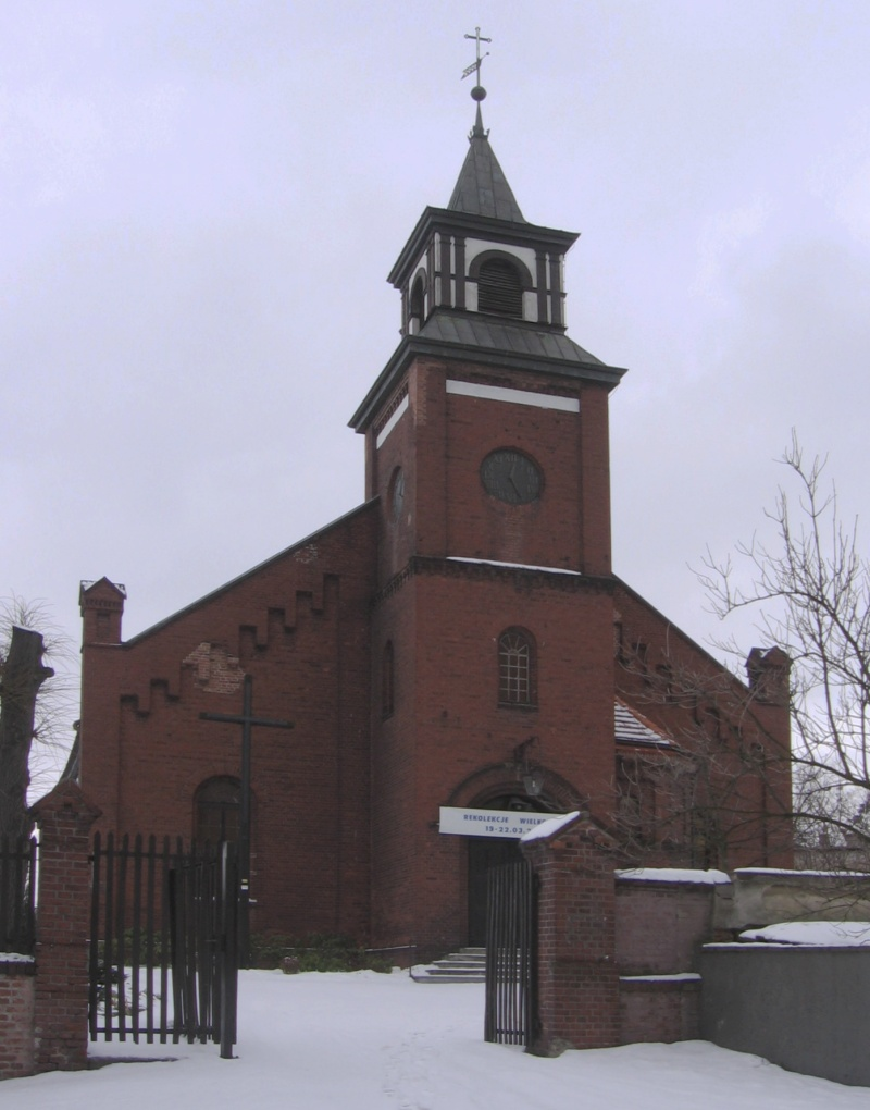 Poland, Wrocław (Swojczyce) St. Jack Church